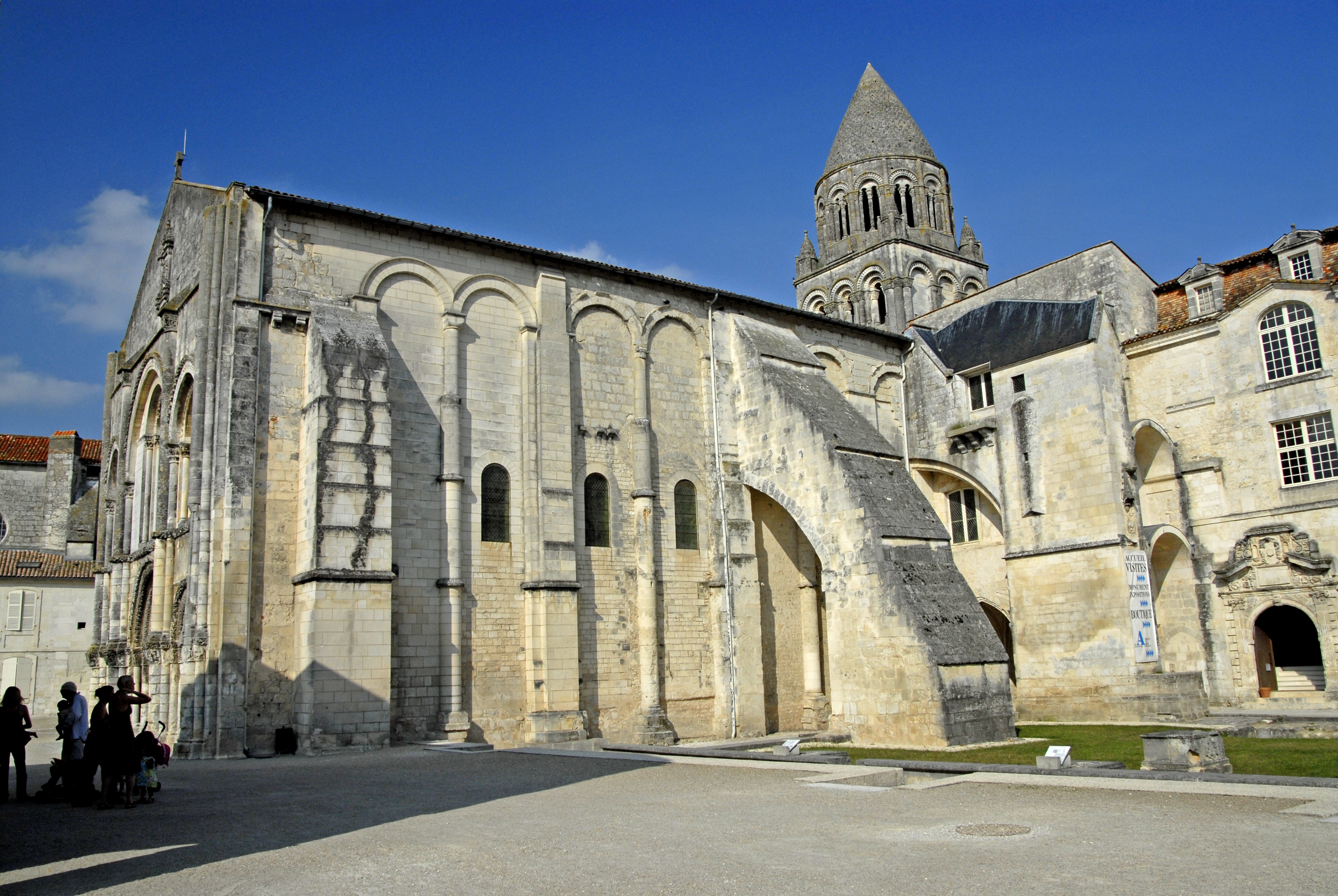 Abbaye aux Dames Saintes, Abteikirche, Südansicht